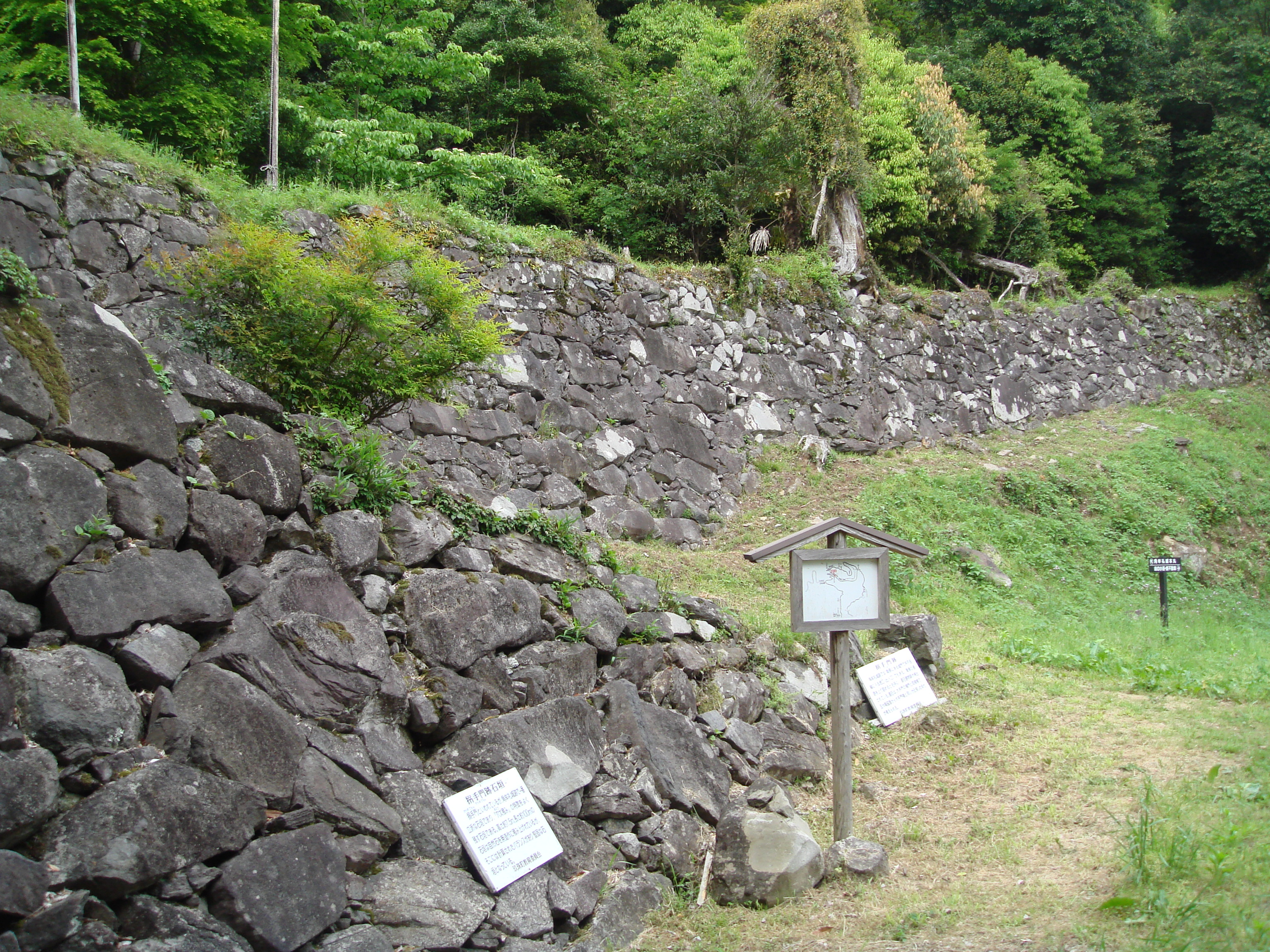 角牟礼城・角埋城（つのむれじょう）は大分県玖珠郡玖珠町にあった日本の中世から近世初期にかけての城である。画像は伝搦手側石垣群を南西方向より北東へ見た場合である。